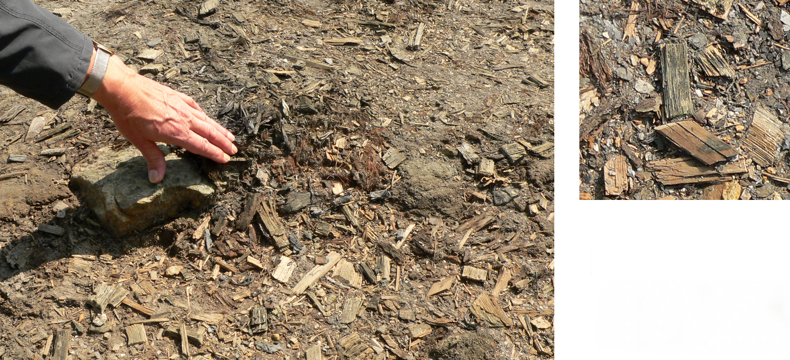 Holzbearbeitungsplatz etwa 14. Jarhhundert am mittelalterlichen Bergwerk im Alten Lager am Rammelsberg